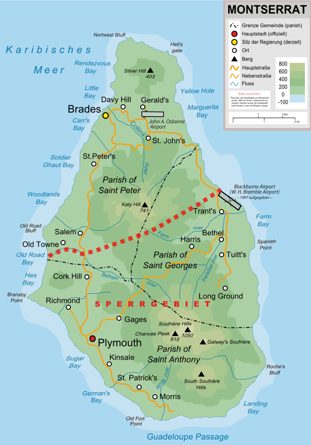 Topographische Karte von Montserrat in Deutsch